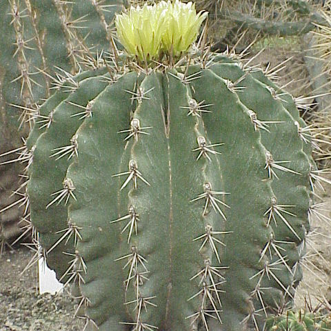 Ferocactus echidne Ferocactus echidne Rotated from original: Name Ferocactus echidne Family Cactaceae Image no. 1 Permission granted to use under GFDL by Kurt Stueber